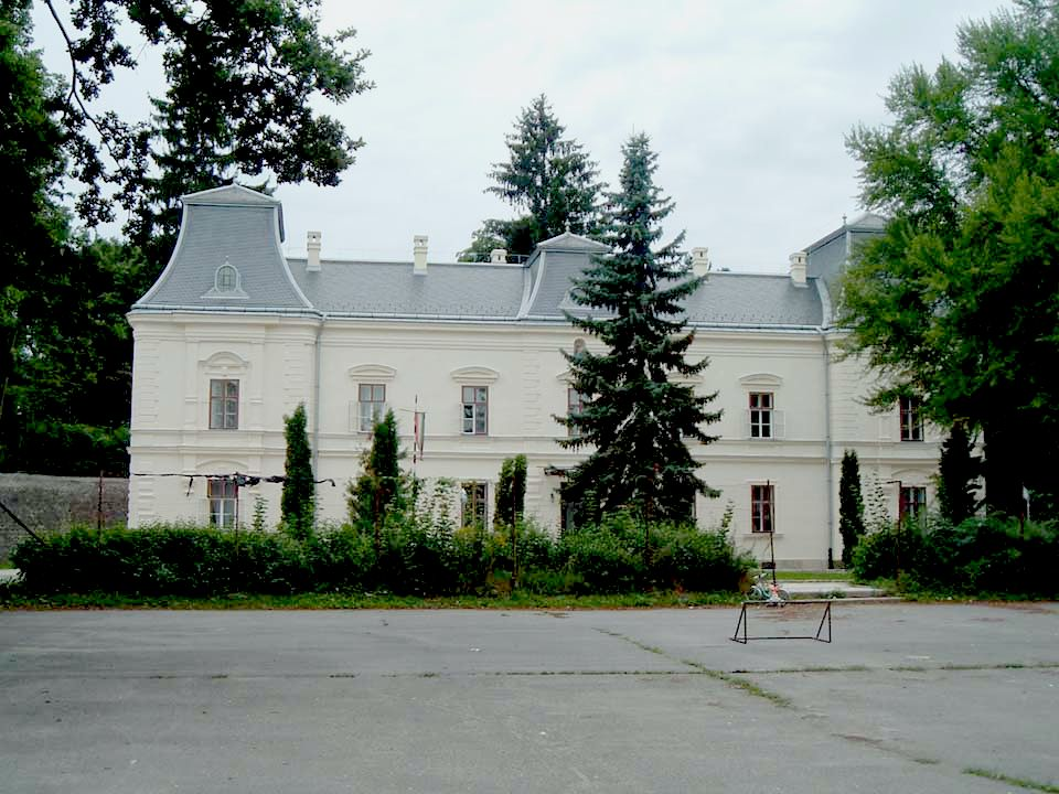 Manor house in Bakonyoszlop, Hungary